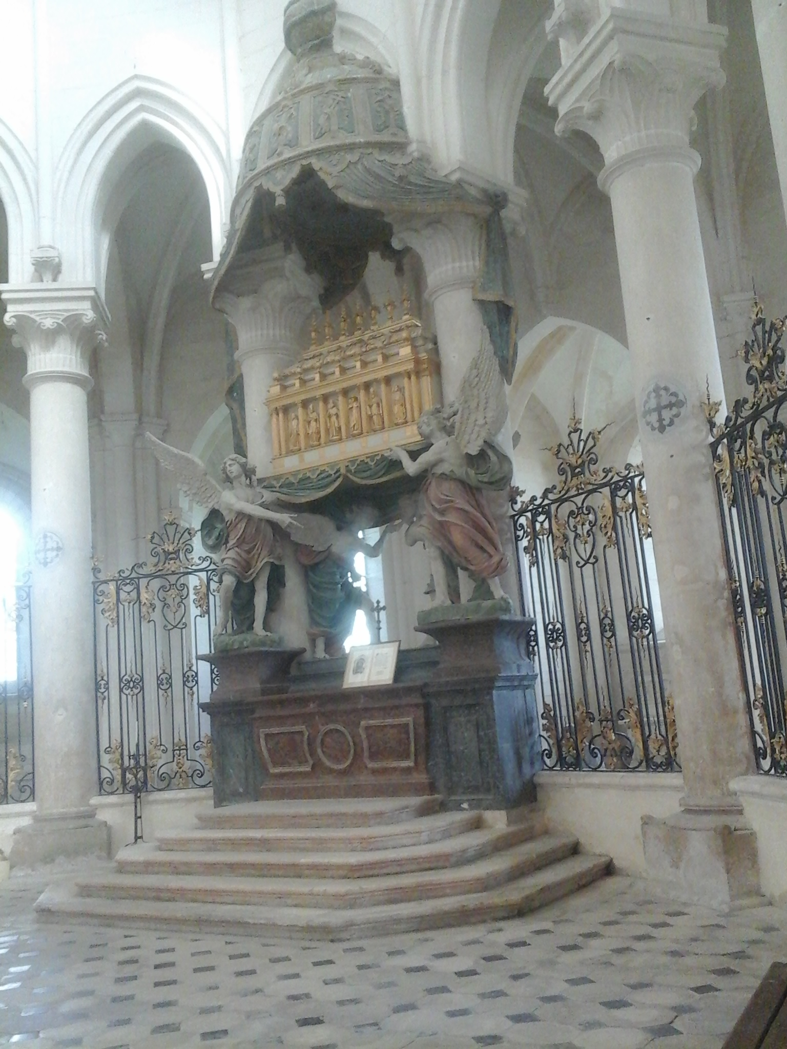 Châsse de saint Edme. Abbatiale de Pontigny.